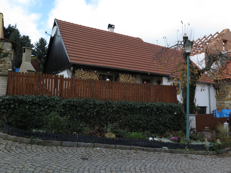 Bolevec čp. 30, Plzeň 1-Bolevec, Hynaisova 30/2, Plzeň.